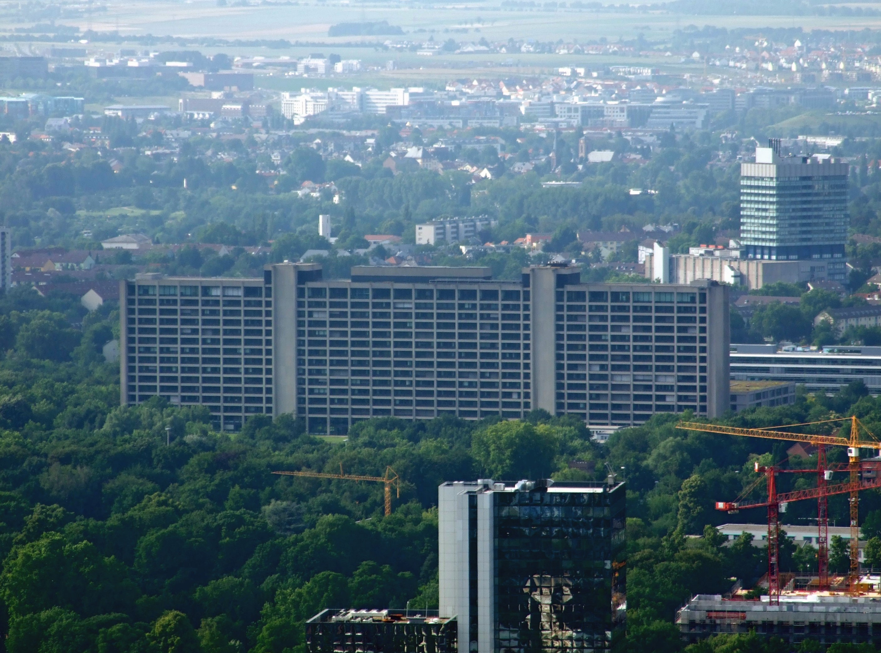 Deutsche Bundesbank gesehen vom MAIN TOWER